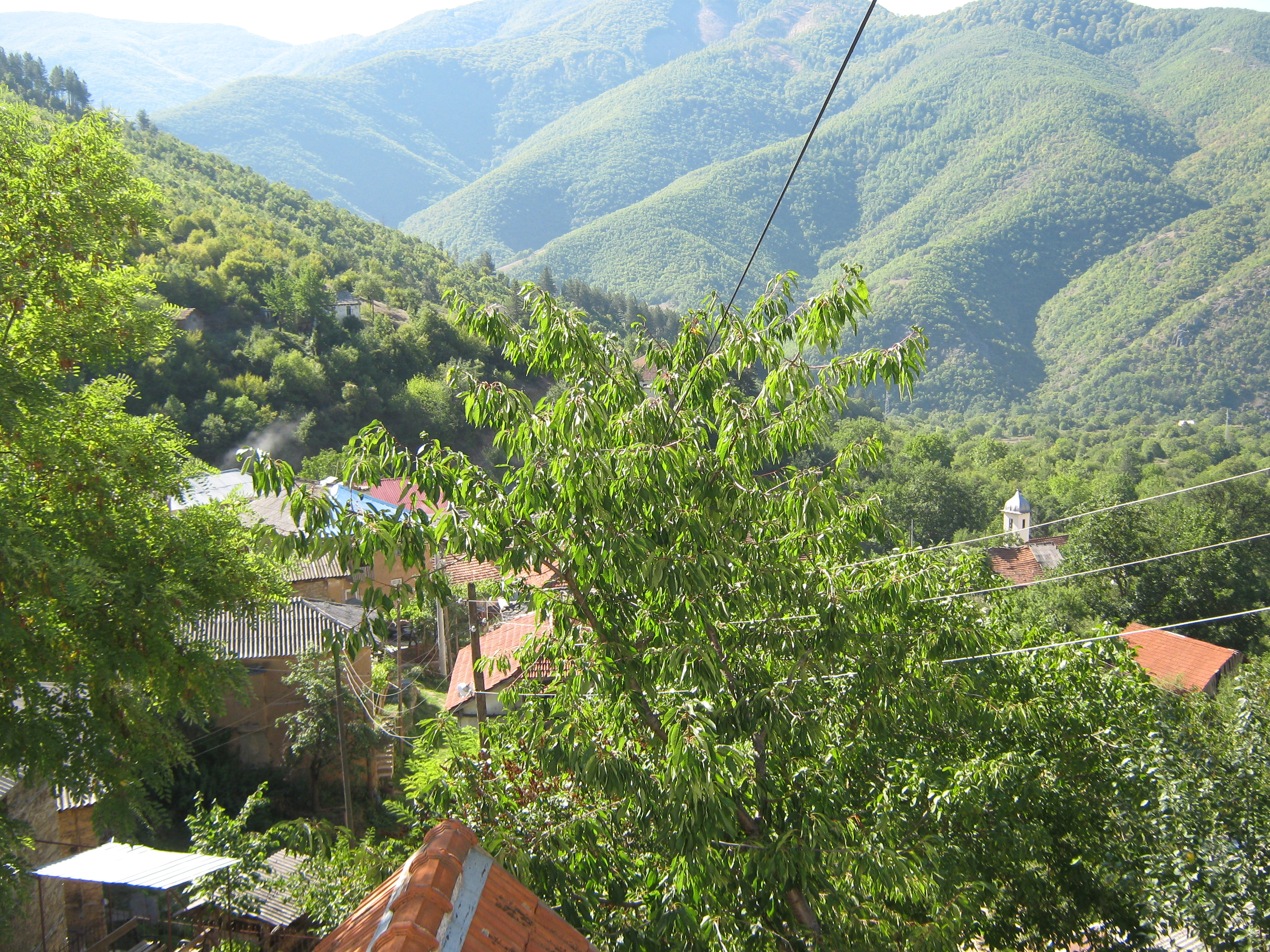 Srpskohrvatski / српскохрватски: Selo Rusjaci,država Makedonija,planinski venac